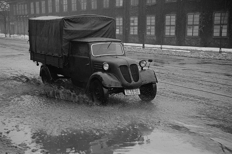 Original image description from the Deutsche Fotothek Bild Lastkraftwagen im Regen auf einer Straße